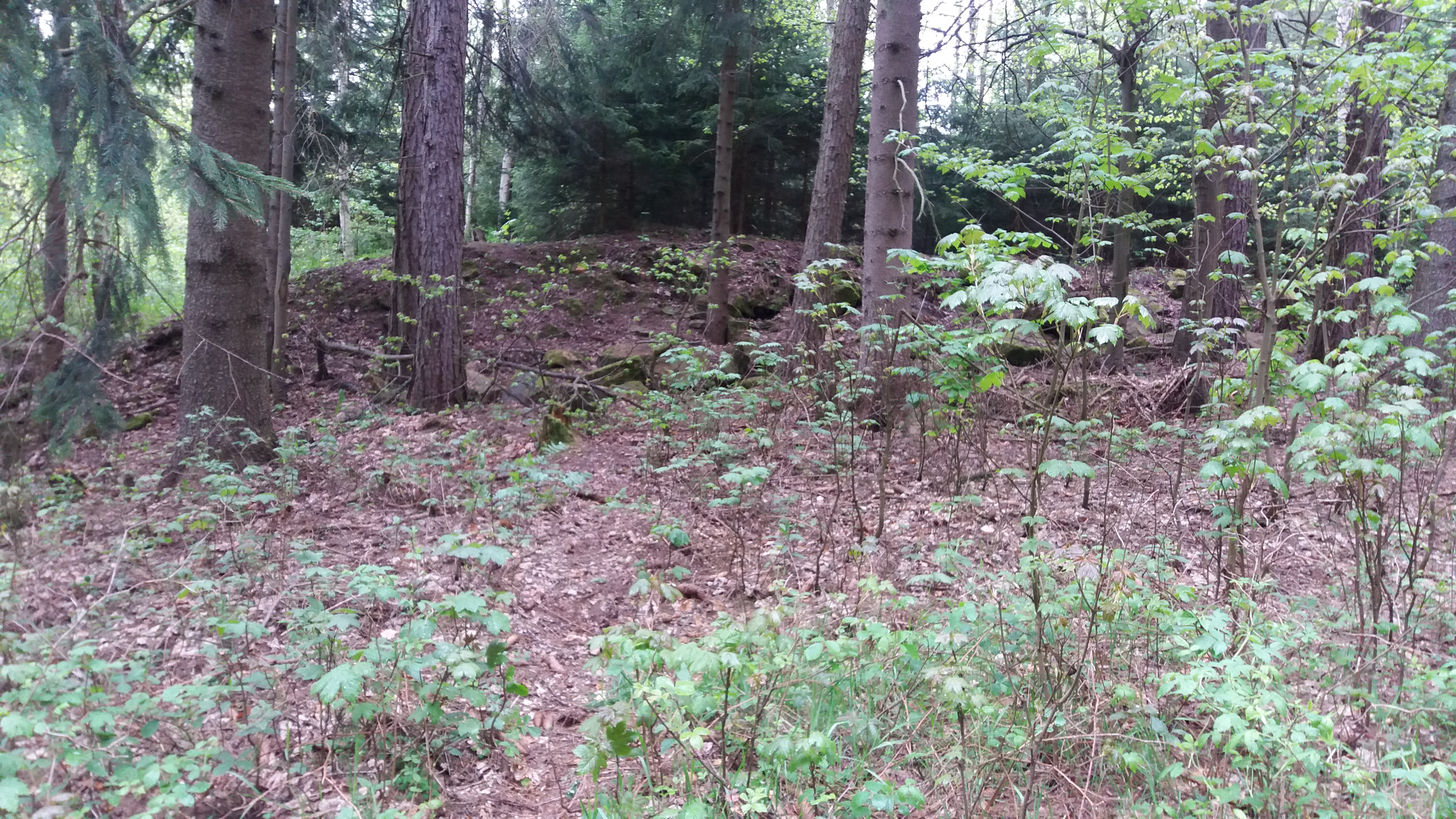 Ruiny kostela sv. Jana Křtitele (Janovičky)